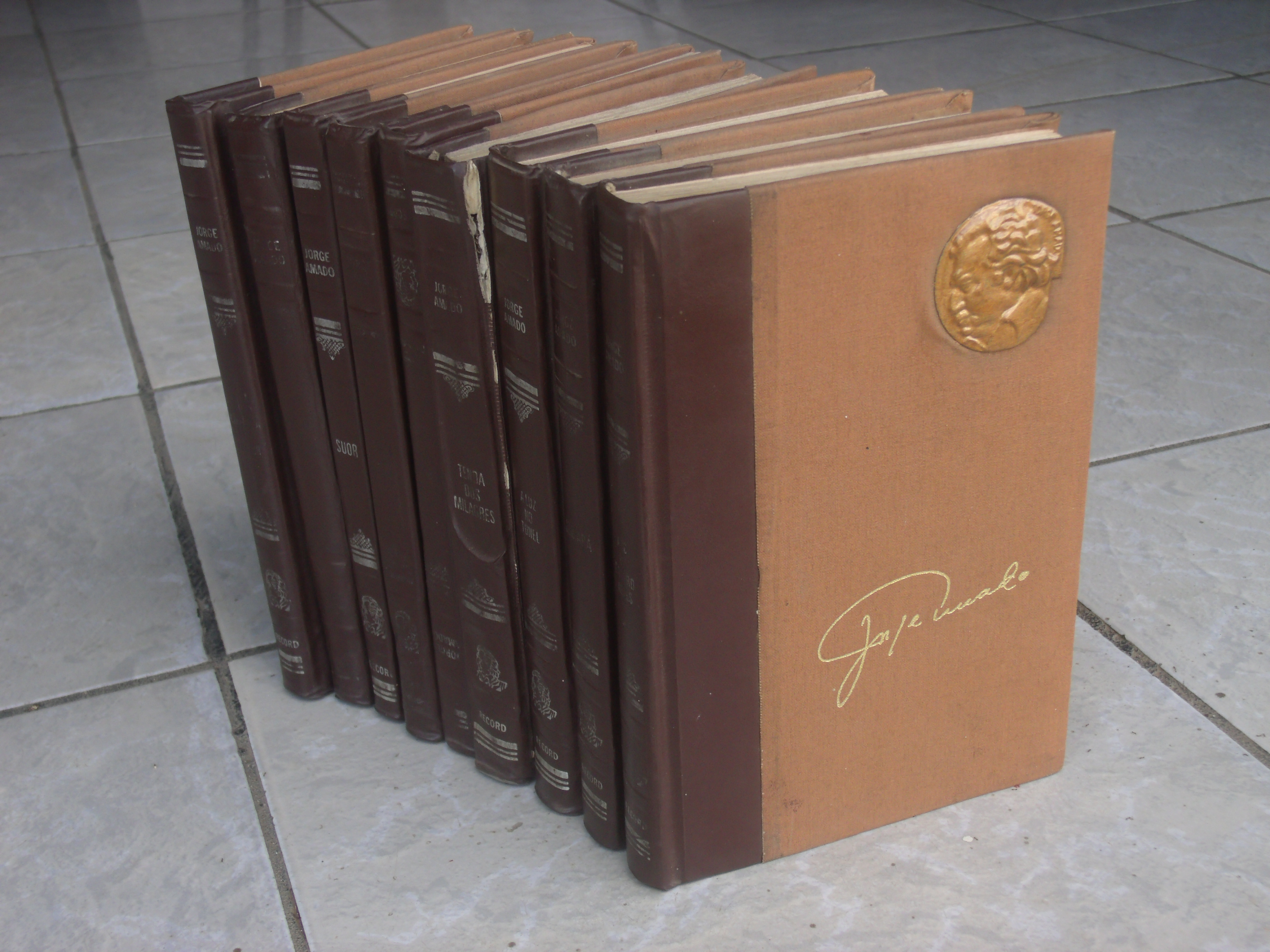 Coleção de Jorge Amado com a assinatura e a efígie do escritor pela editora Record em 1983. Jorge Amado pertenceu a Academia Brasileira de Letras.